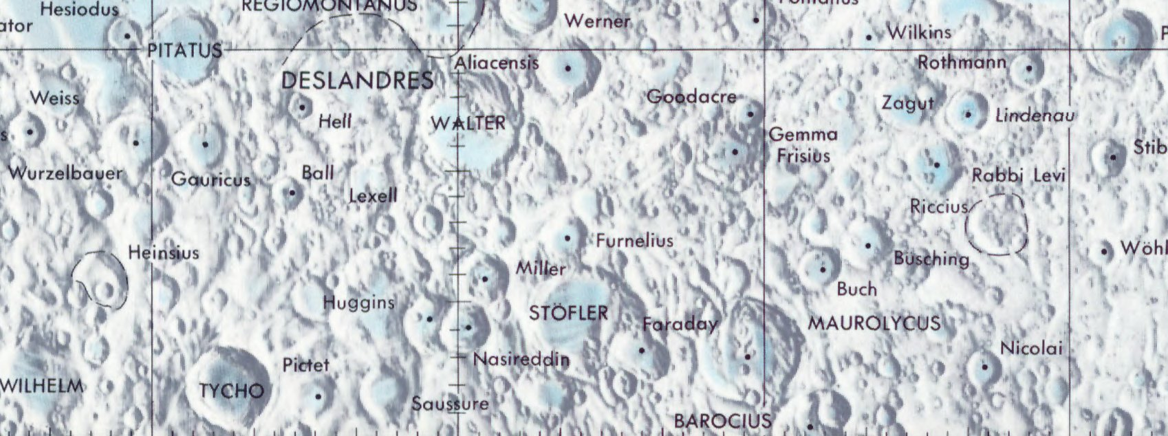 Cráter lunar Stöfler. Localización. (Lunar Chart LPC1. Second Edition)